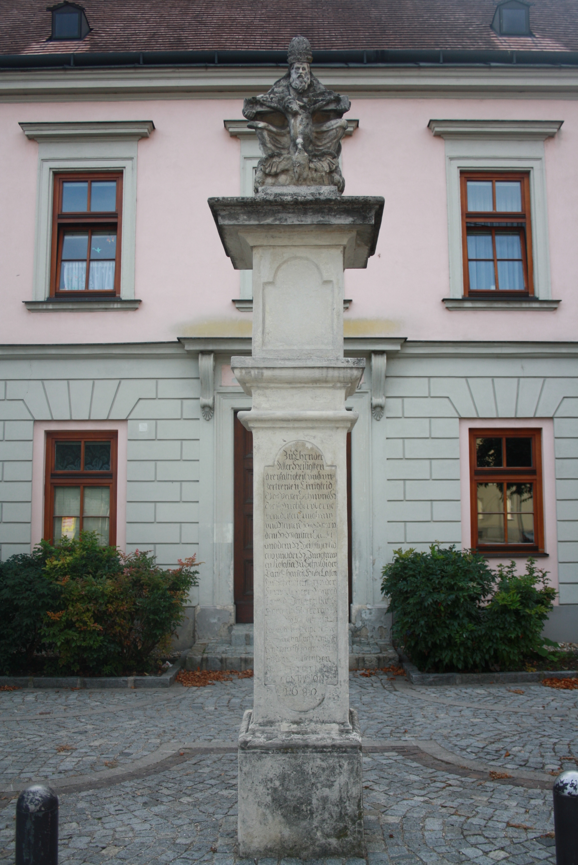 Pest-/Dreifaltigkeitssäule in Stockerau